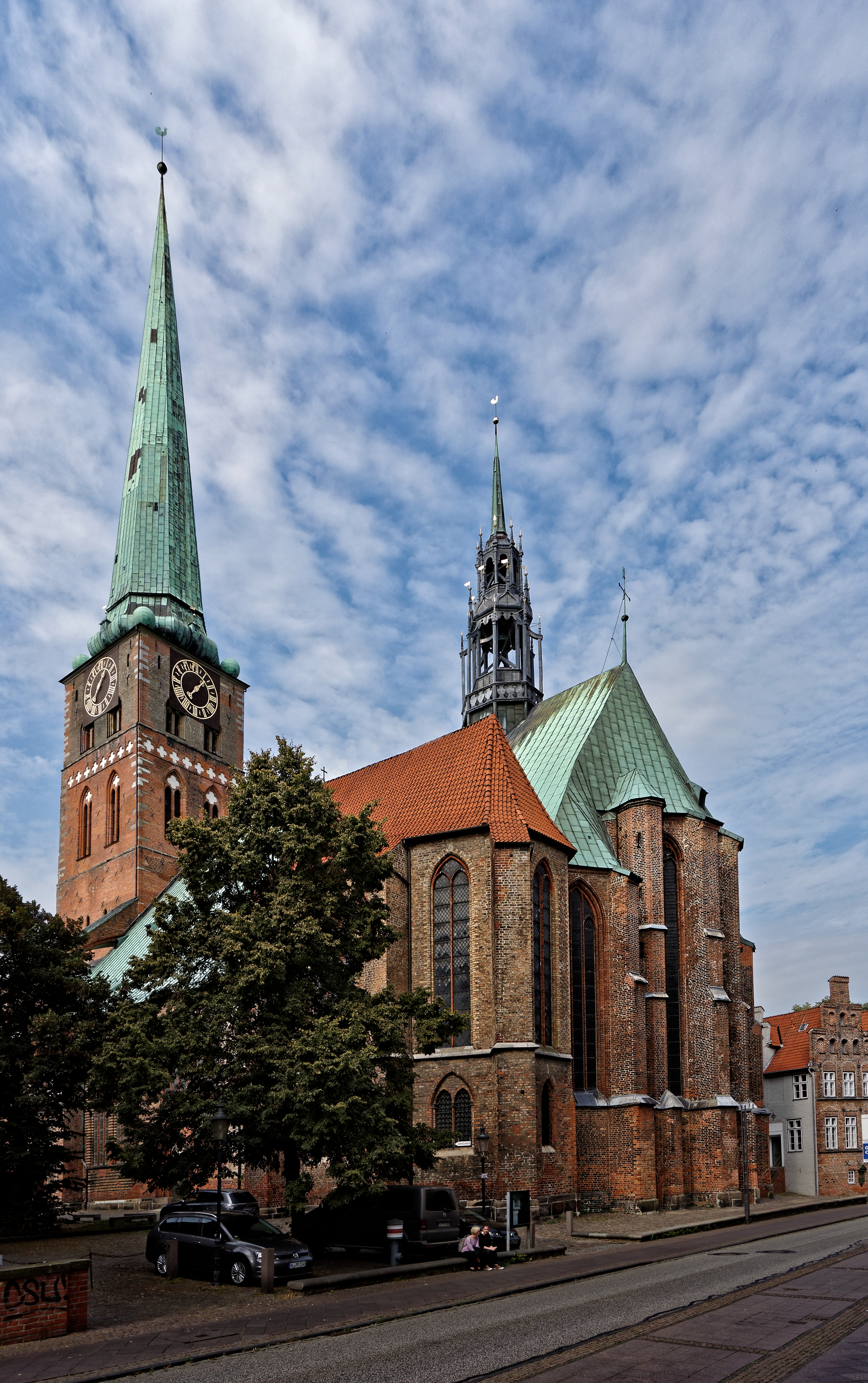 Jakobikirche von der Königstraße aus gesehen